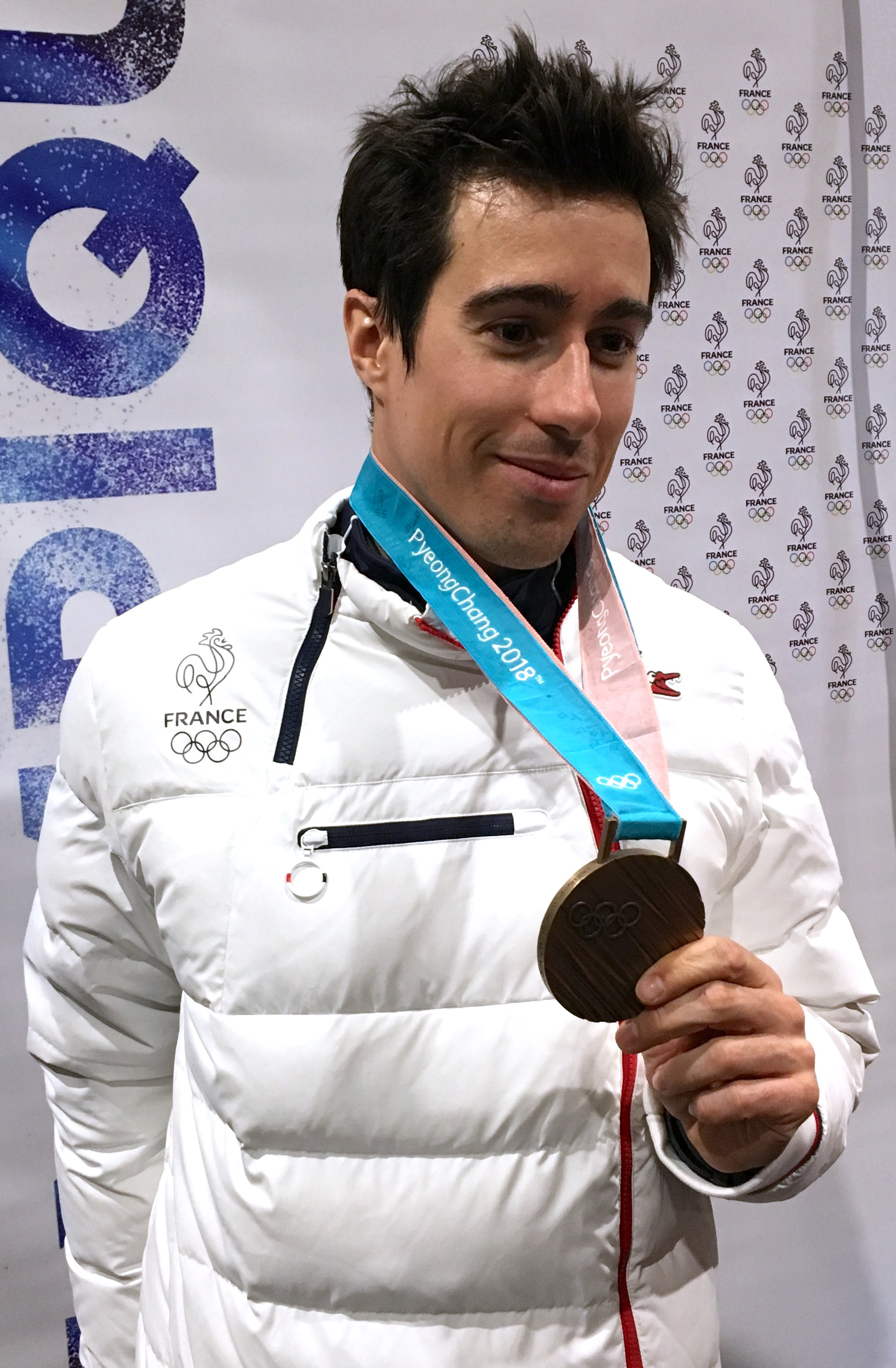 Victor Muffat-Jeandet durant la soirée de retour des athlètes des Jeux olympiques de Pyeongchang 2018 à Grenoble arborant sa médaille de bronze obtenue en combiné.